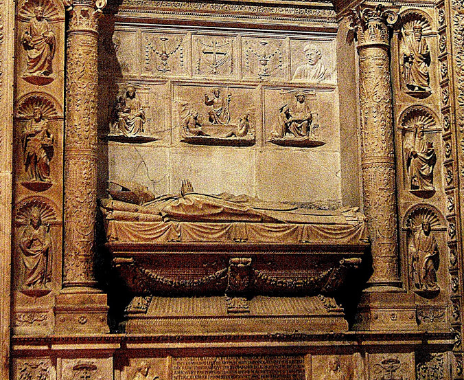 Sepulcro del cardenal Diego Hurtado de Mendoza (1444-1502), que fue arzobispo de Sevilla, en el lado del Evangelio de la capilla de la Virgen de la Antigua de la catedral de Sevilla, (España).